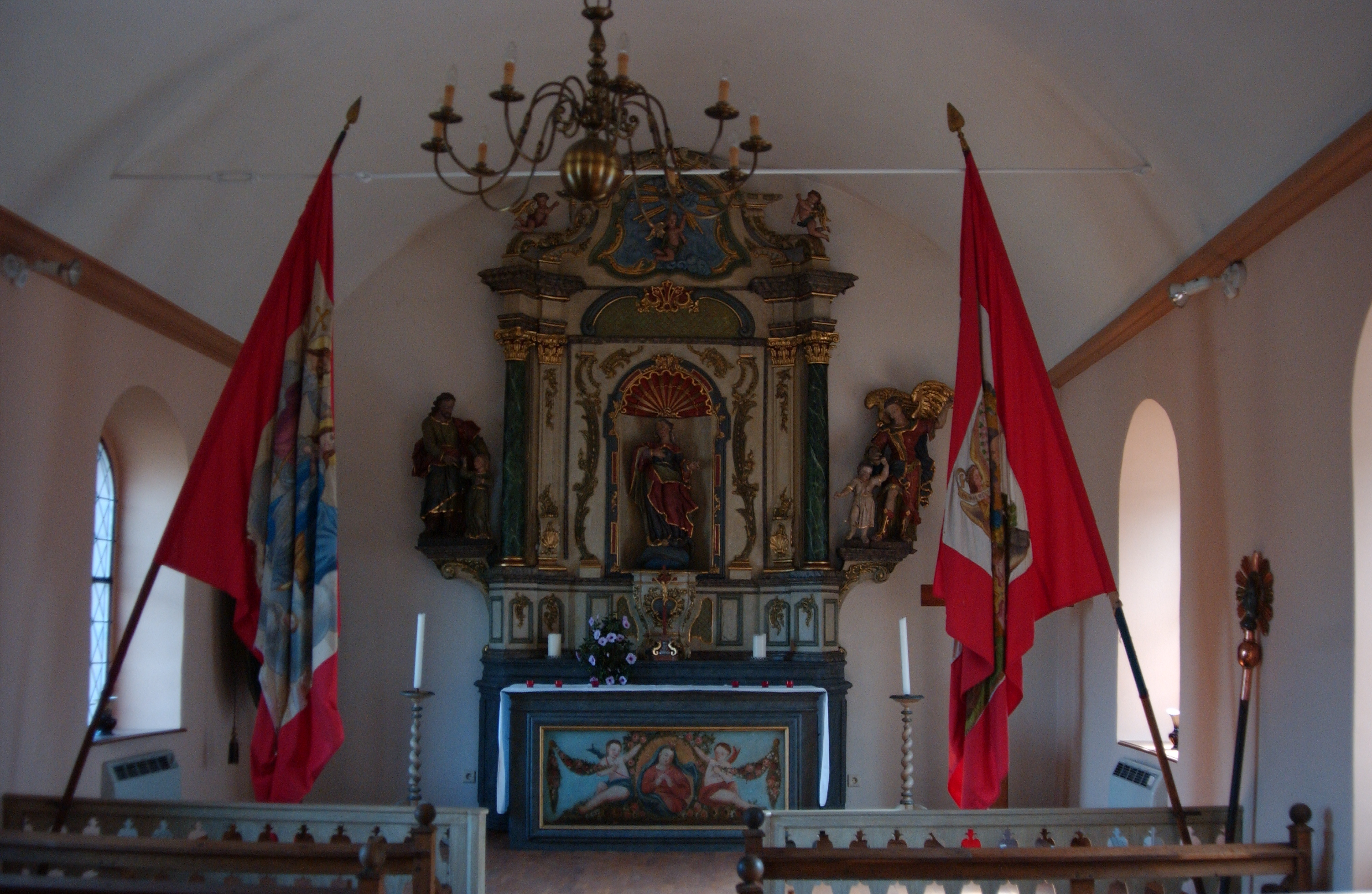 La figure centrale du retable reprend le thème de l’Immaculée Conception marchant sur le croissant de lune et le serpent qui figure dans la niche qui surplombe la porte d’entrée. Les statues de Saint Joseph et de l’Ange gardien renvoient à d’autres points forts de la piété baroque.